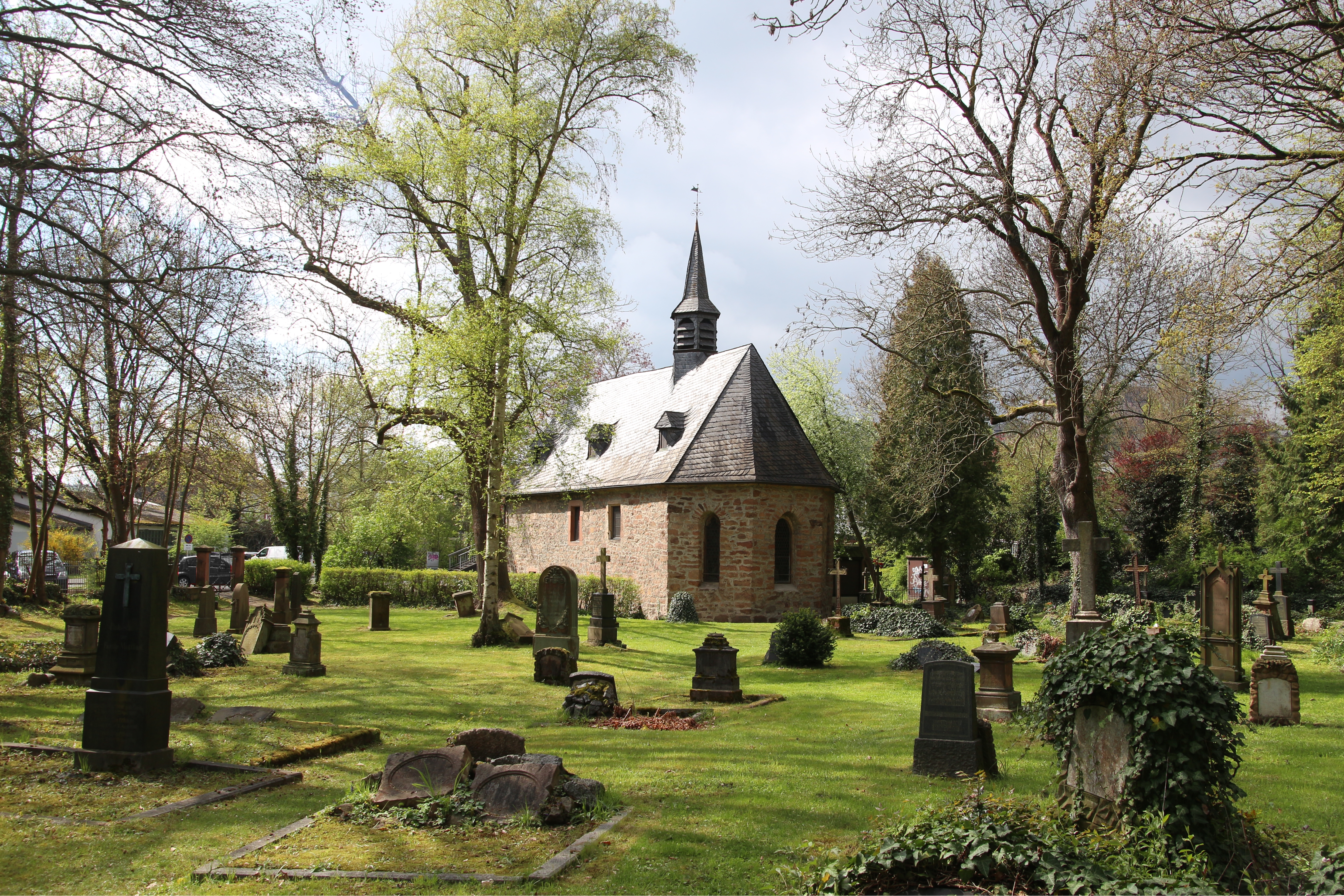 Siehe Bild und Dateiname